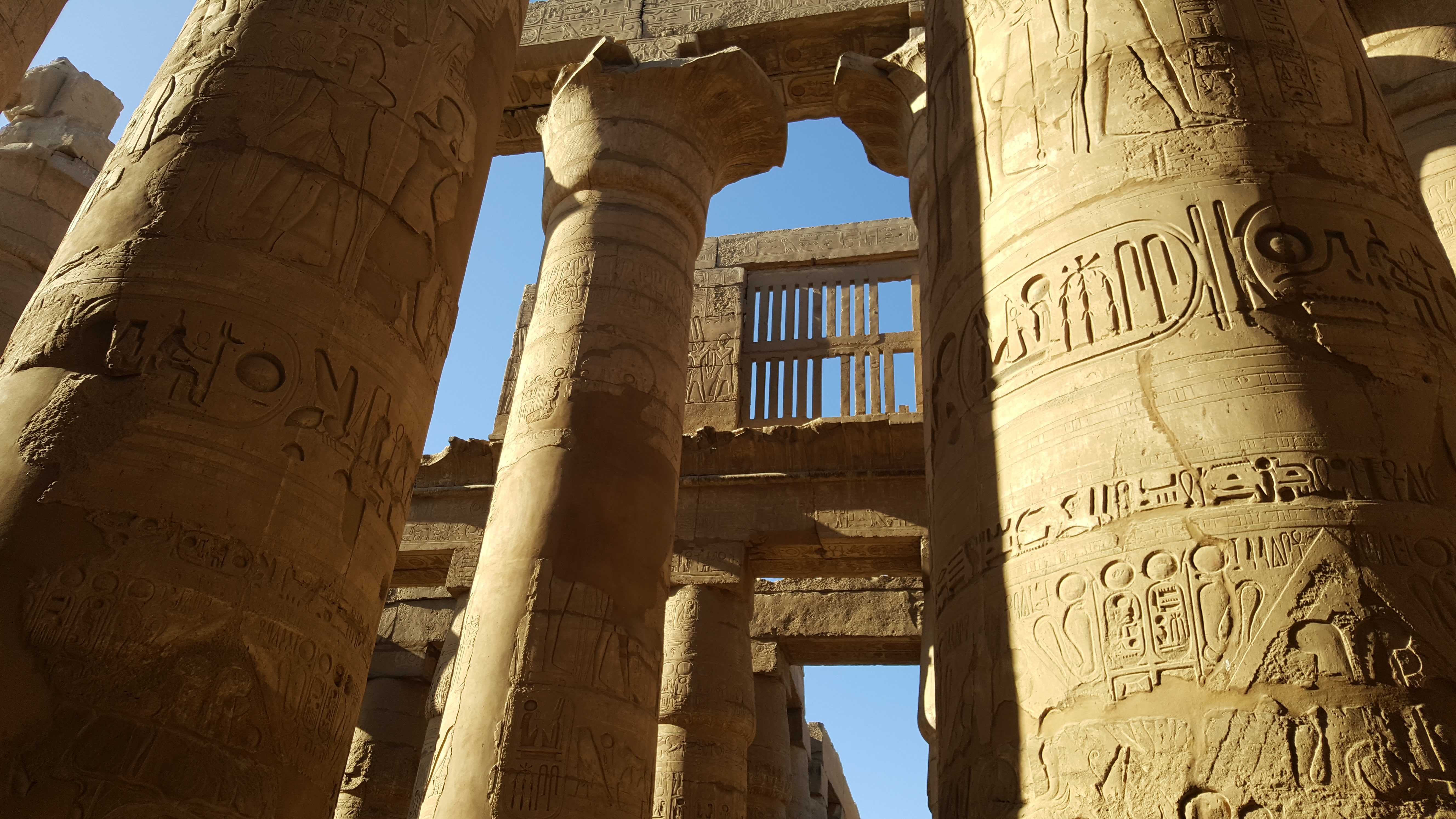 Karnak temple complex